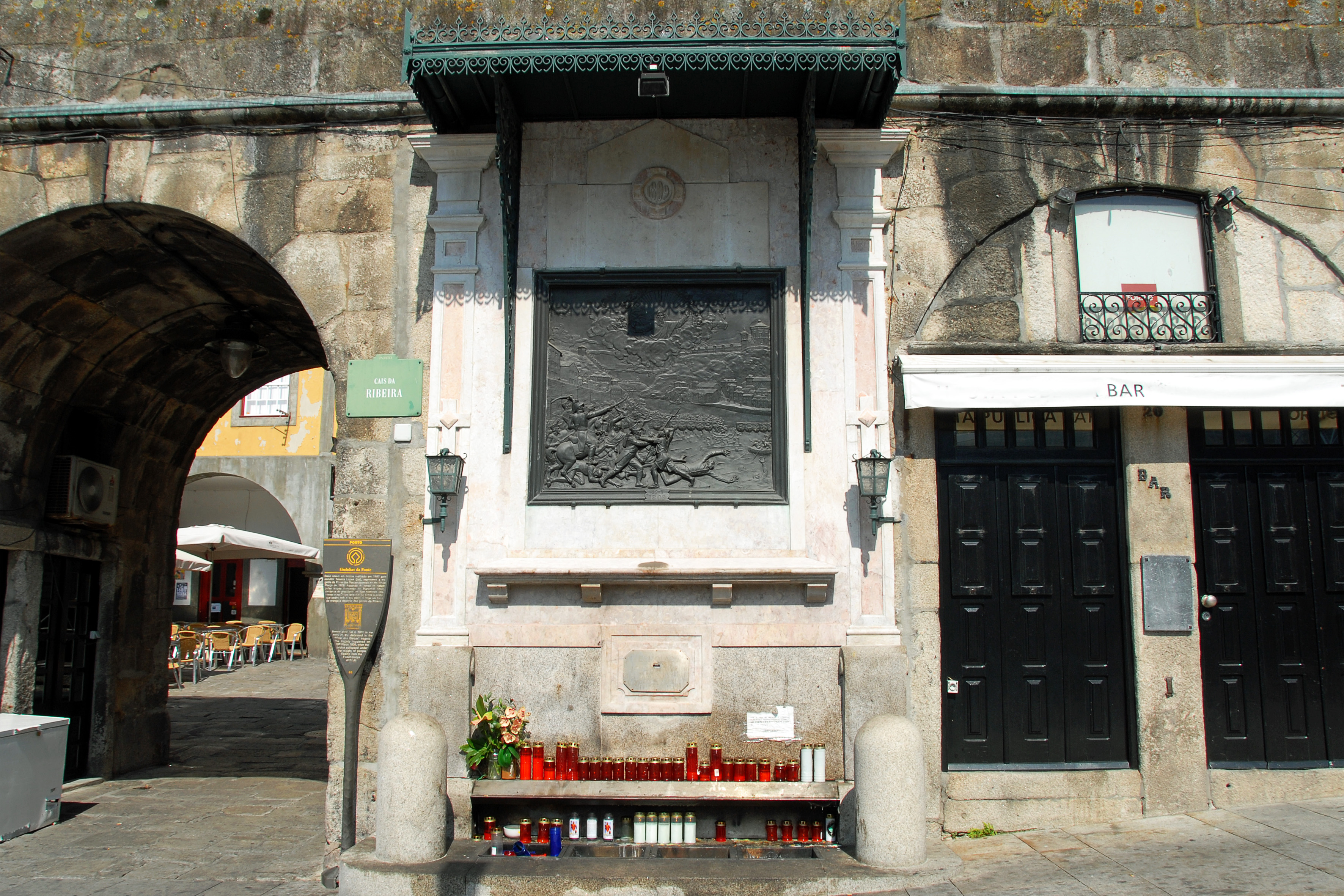 Alminhas da Ponte This file was uploaded for Wiki Loves Monuments in Portugal with the unique identifier 71533.